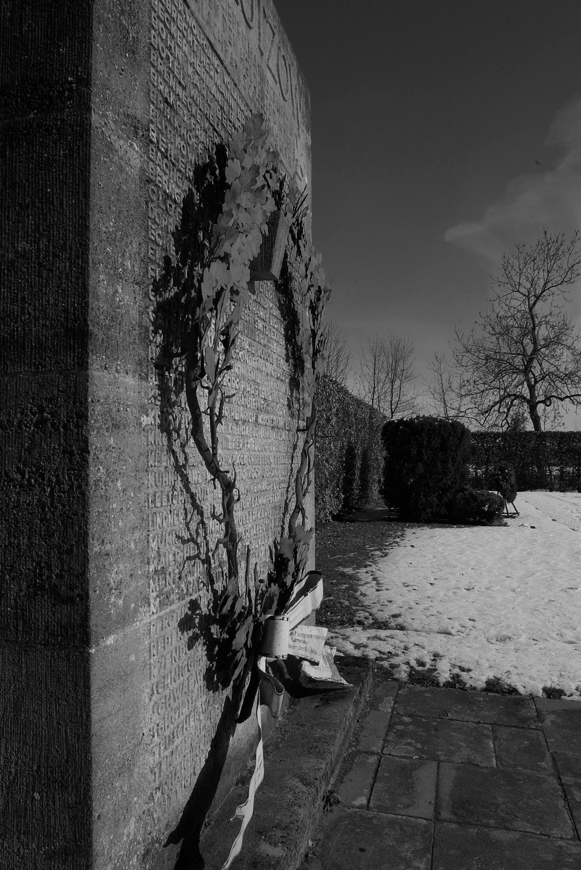 Ehrenfriedhof Wilhelmshaven Gedenkstein Lützow.jpg